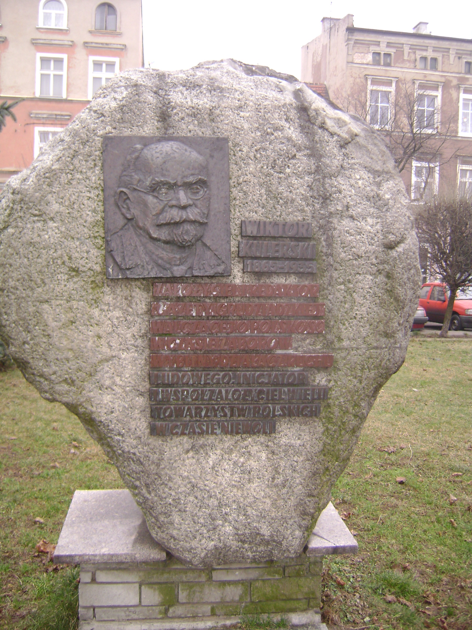 Tablica pamiątkowa Wiktora Kulerskiego przy Alei 23 Stycznia w Grudziądzu